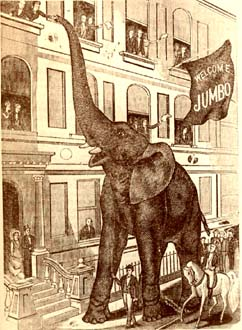 Jumbo